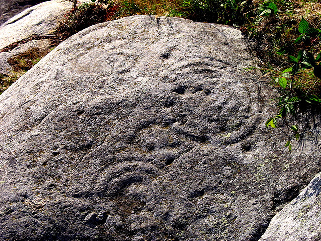 Petroglifo do Pedroso (Compostela)